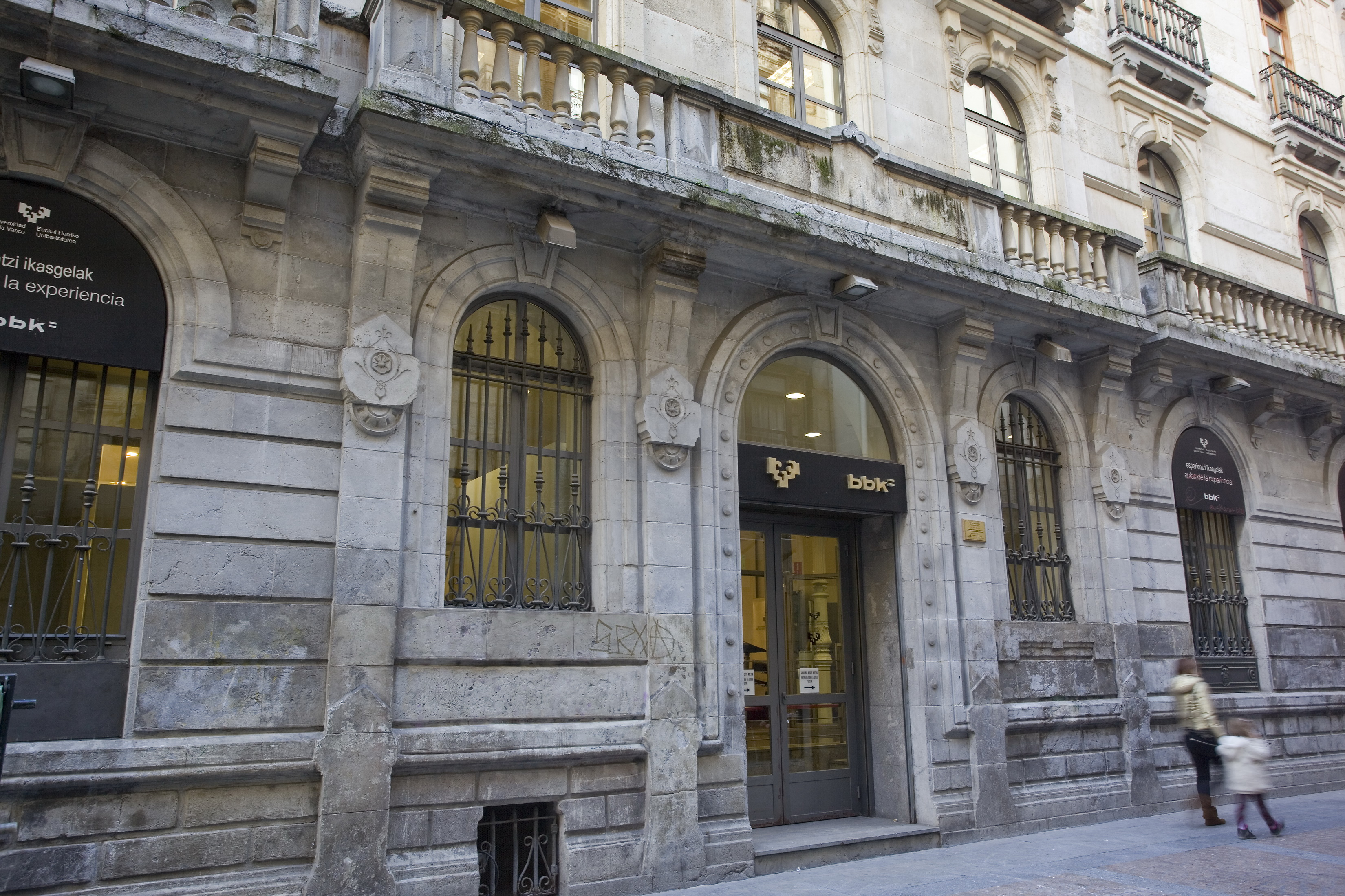 aulas de la experiencia